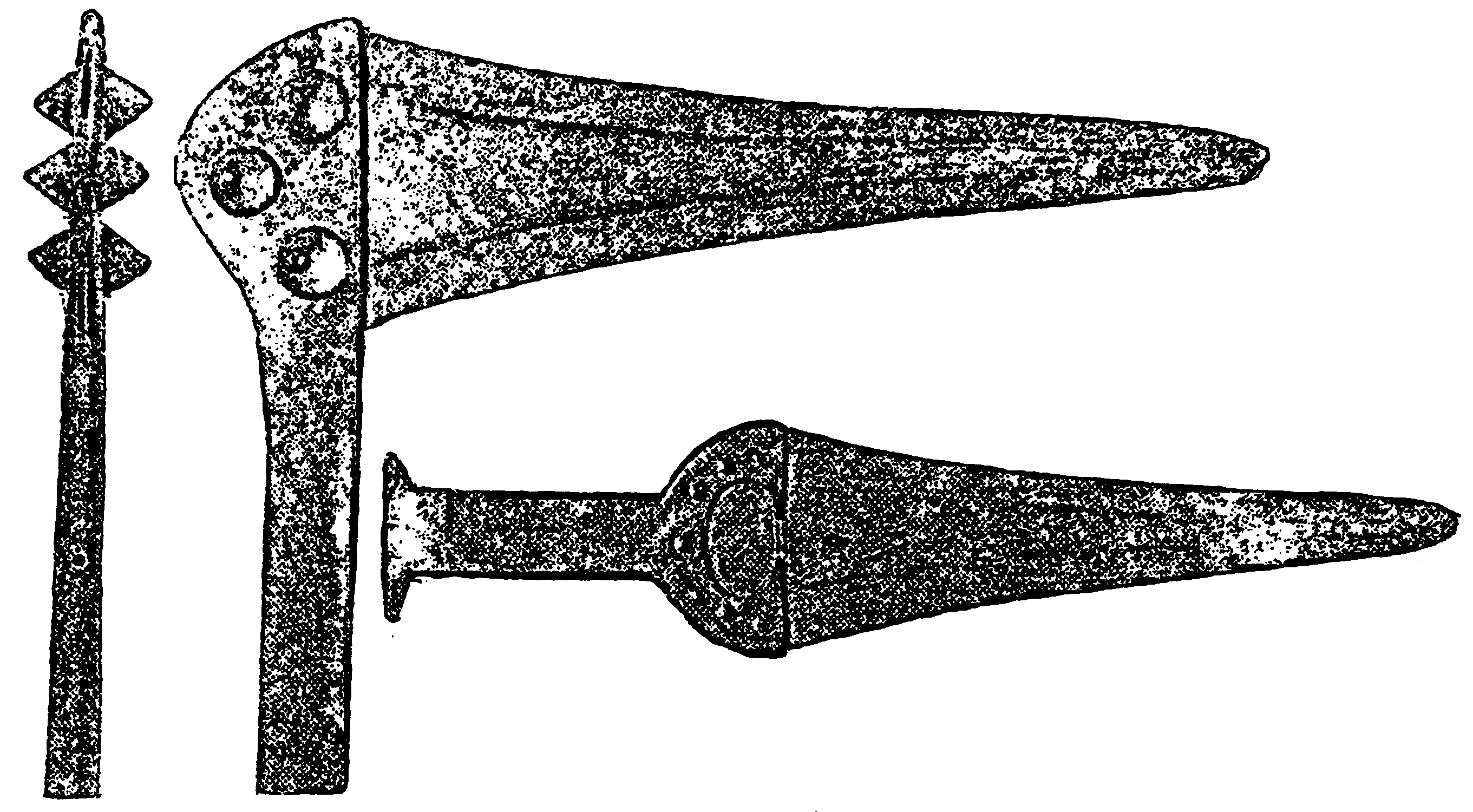 Bronzefund (wahrscheinlich Depotfund) aus Halle-Kanena